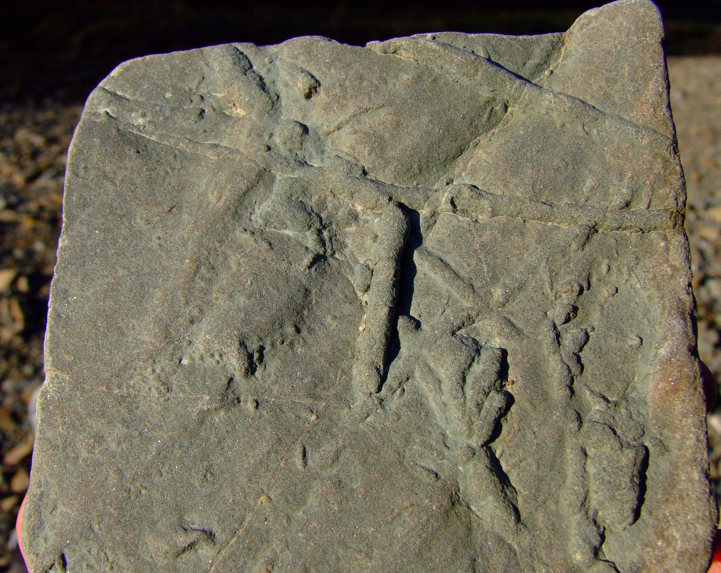 Hieroglify na piaskowcu (rzeka Słopniczanka w Beskidzie Wyspowym (w Tymbaku na "Tabacorzu" pod Paprocią)